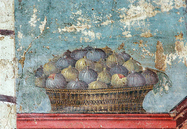 Fresc amb una panera de figues al Triclinium de la Vil·la Popea a Oplontis (Itàlia).